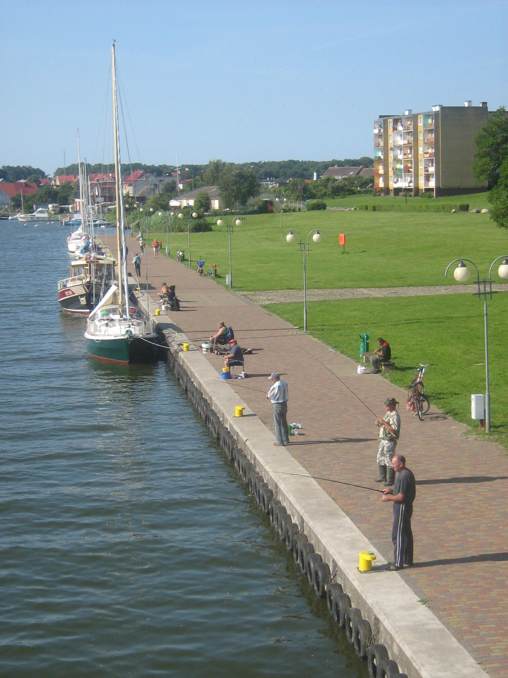 Nabrzeże w Wolinie